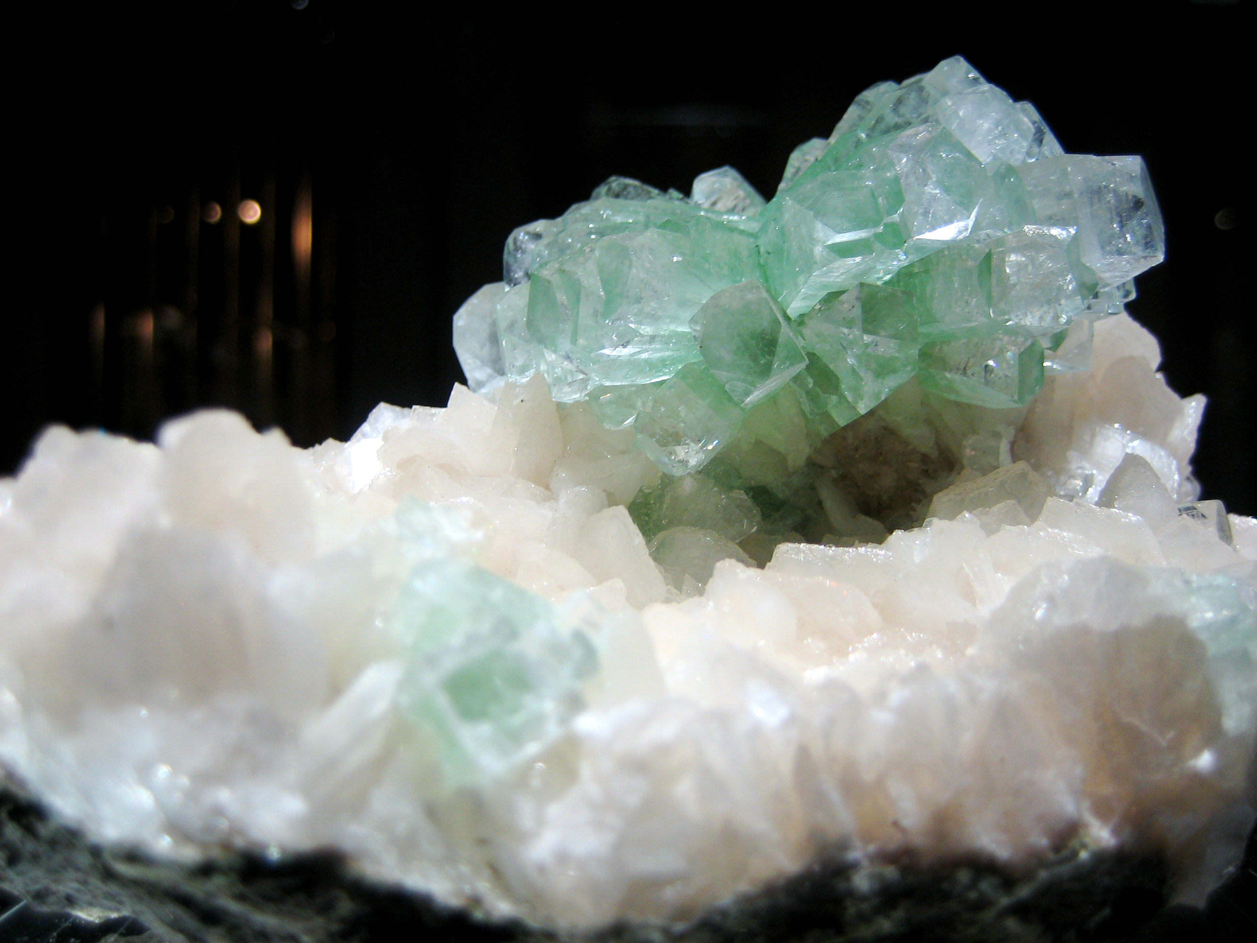 Fluorapophyllite mineral on stilbite mineral